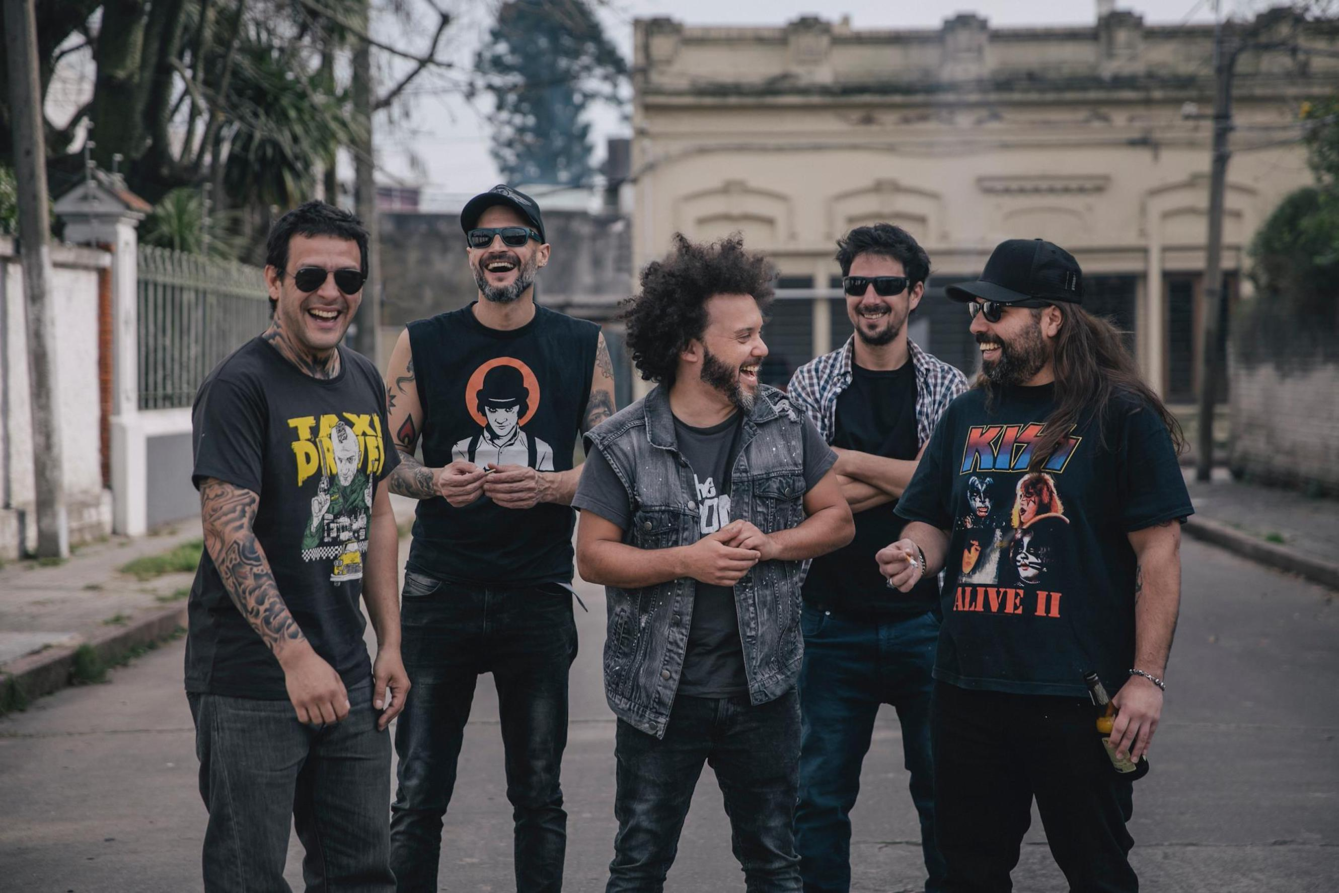 Once Tiros Oficial